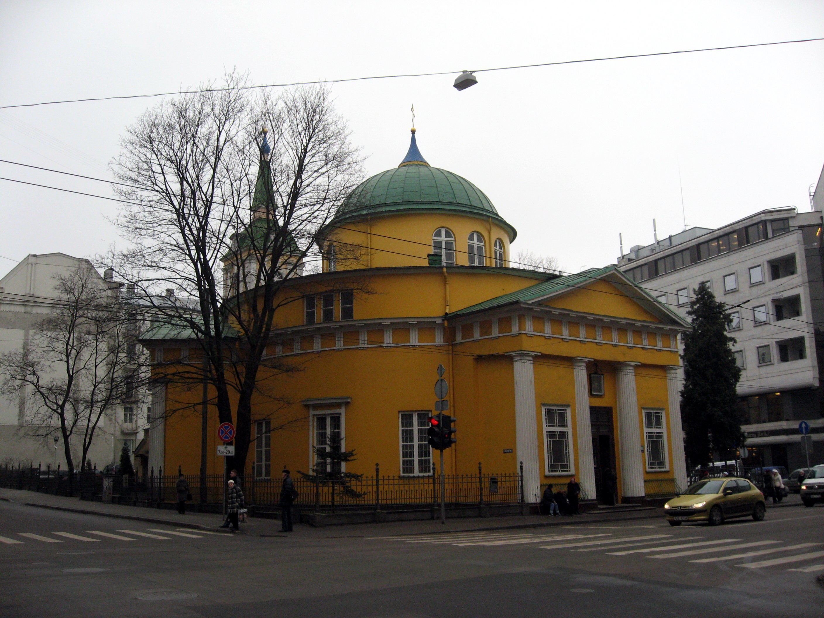 Kostel u Brīvības iela